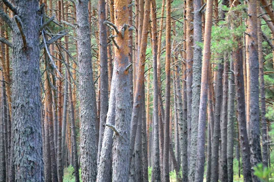 peguerinos (Avila, Spain)